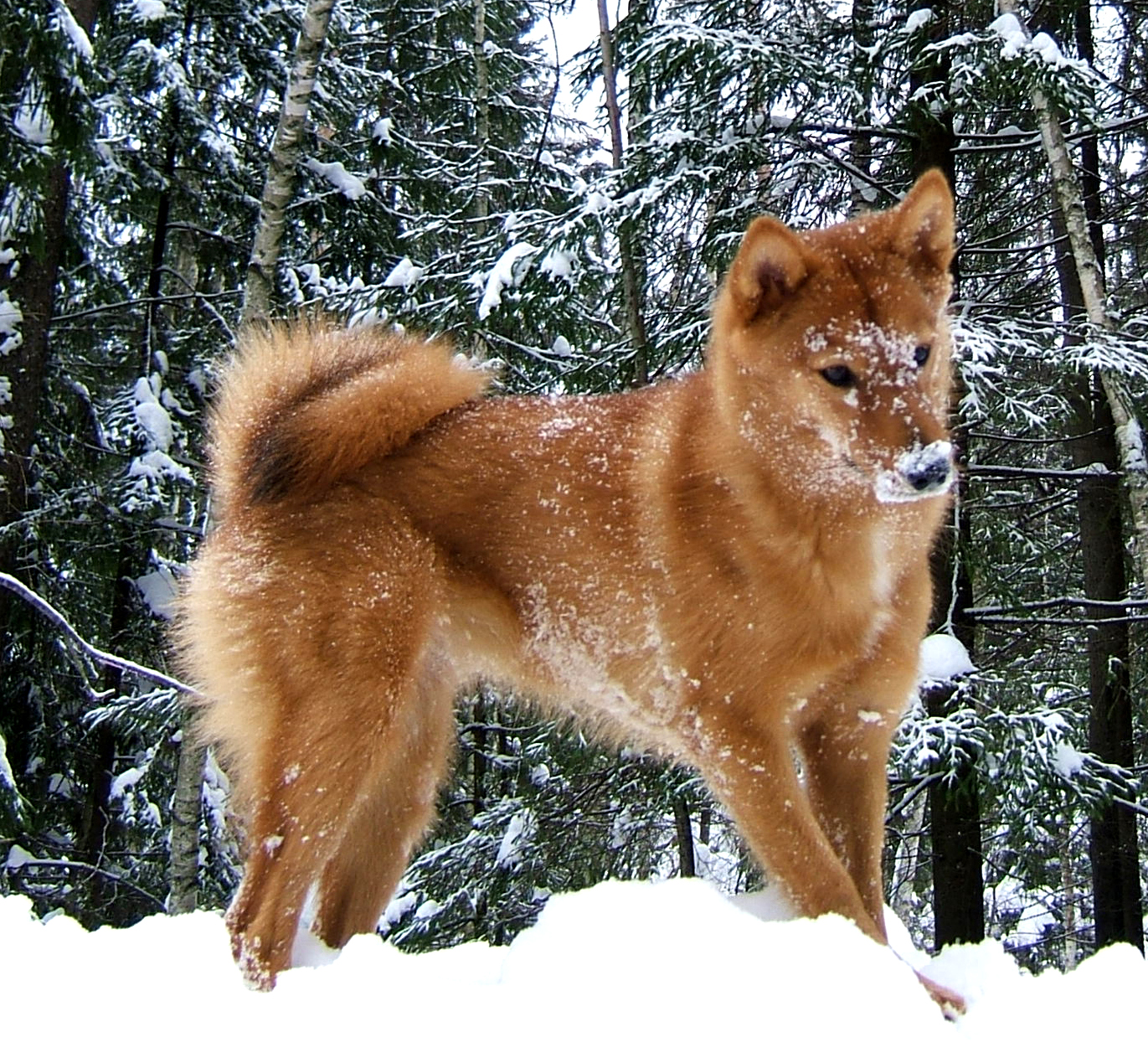 Карело-финская лайка Финский шпиц ("